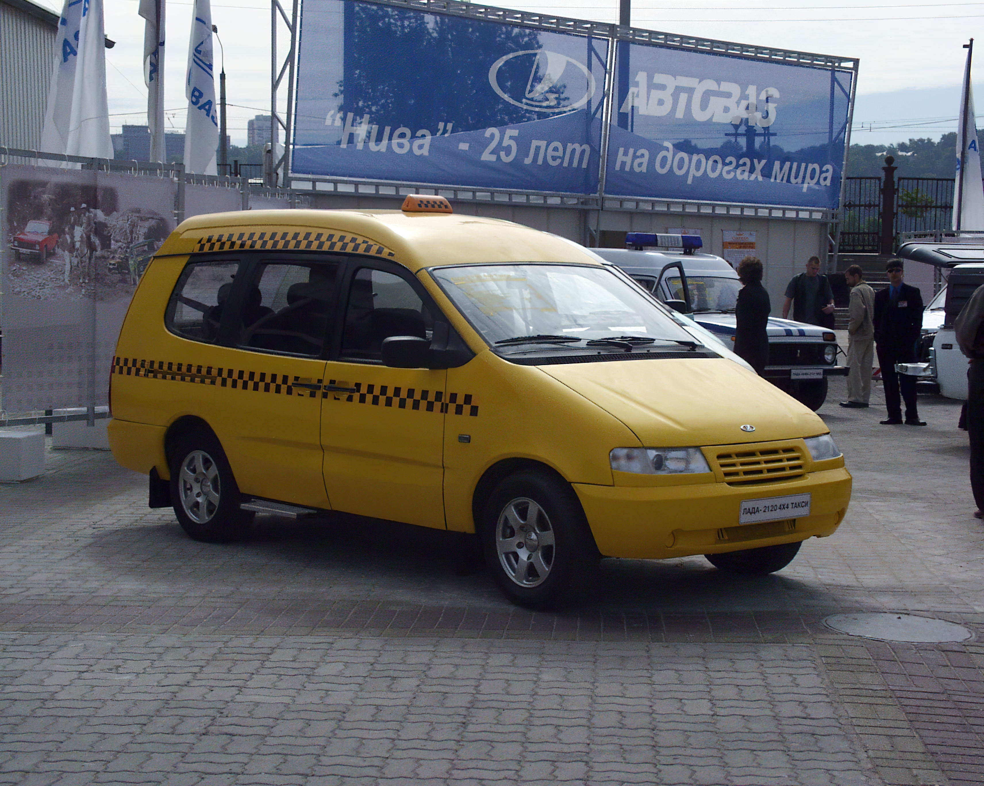 LADA 2120 Такси на Автофоруме-2002 (Нижний Новгород)